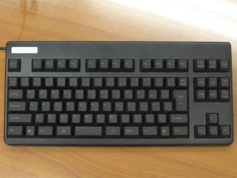 Topre Realforce 91UBK